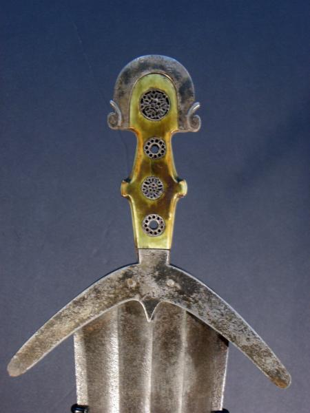 Cinquedea italiana